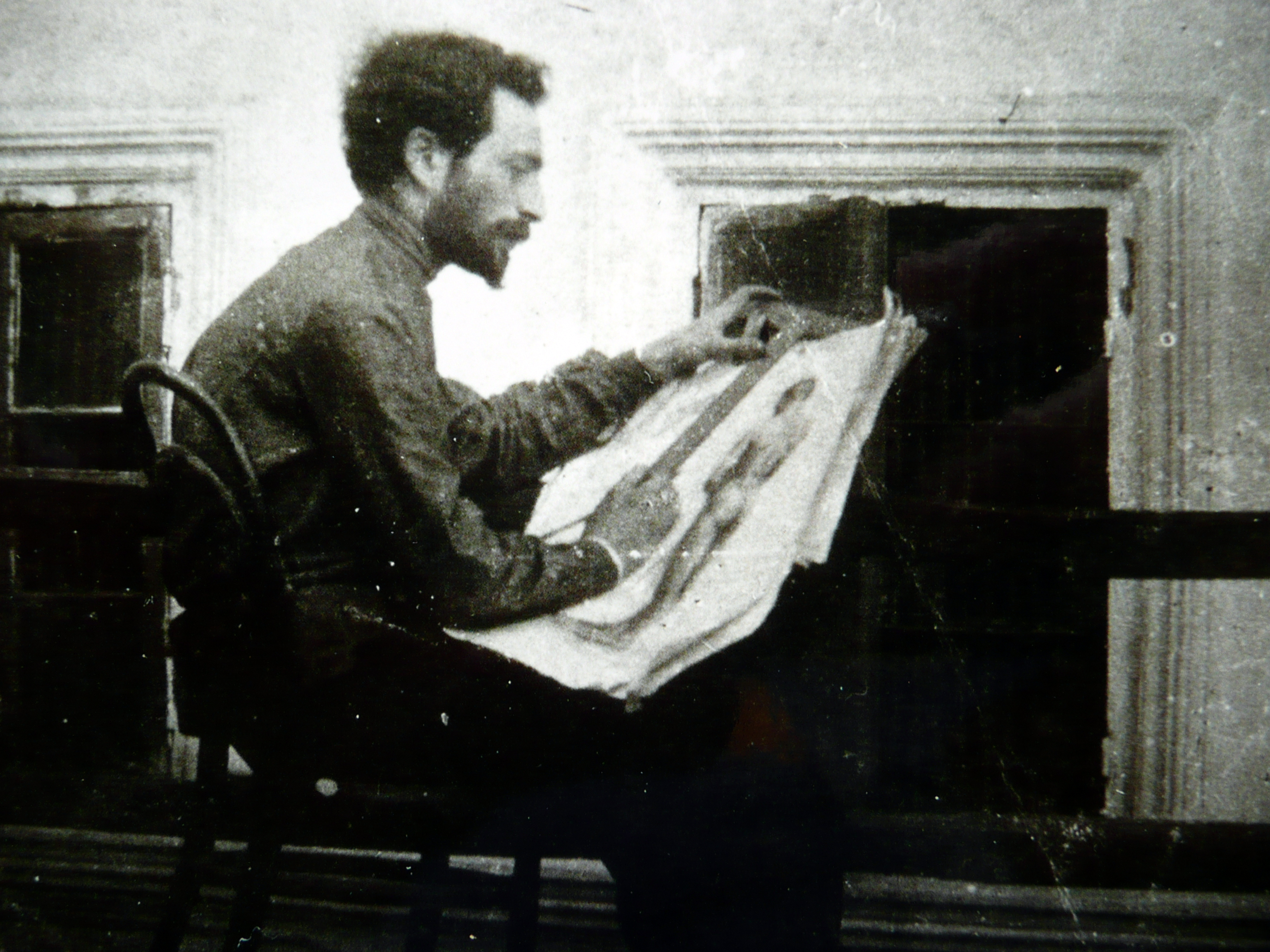 יצחק זקסנברג הצעיר מצייר